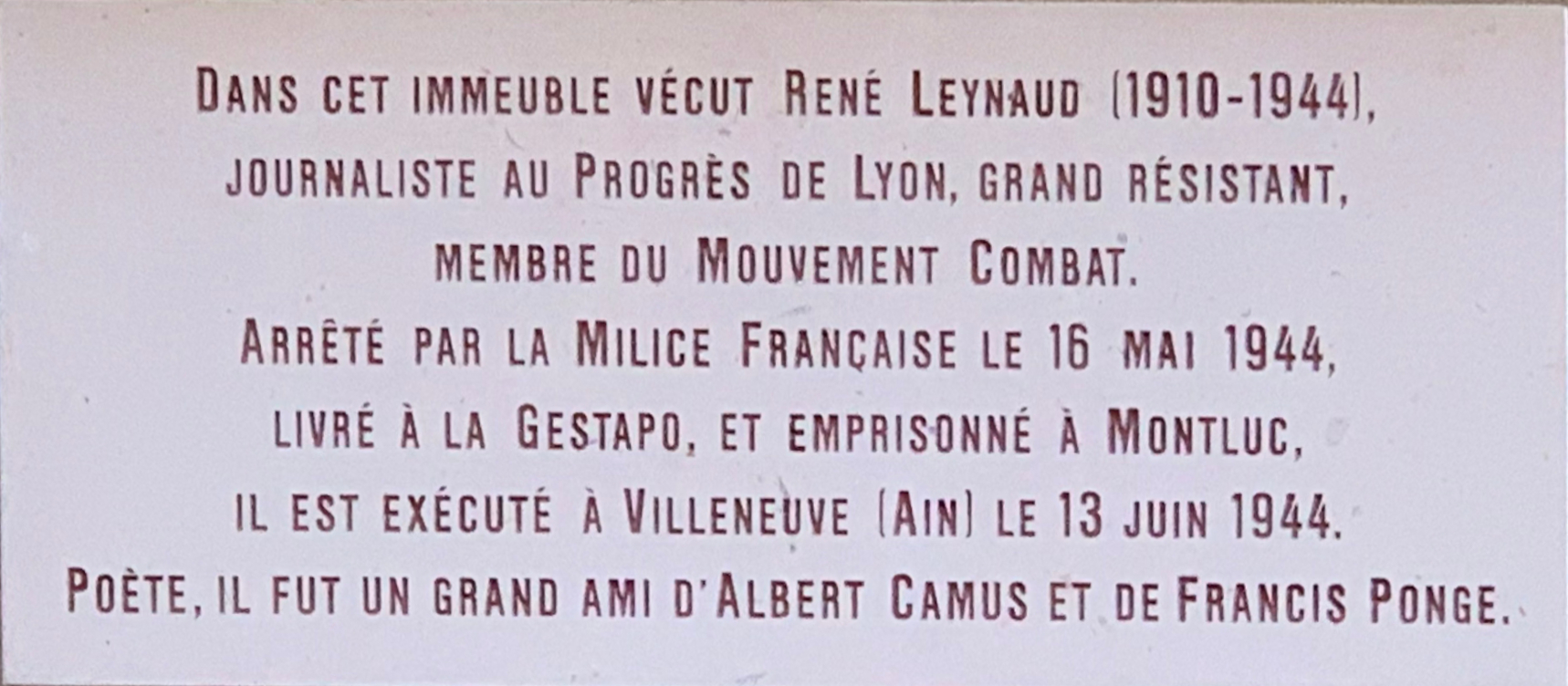 Plaque à René Leynaud, au-dessus de la porte du numéro 6 - rue René Leynaud (Lyon).